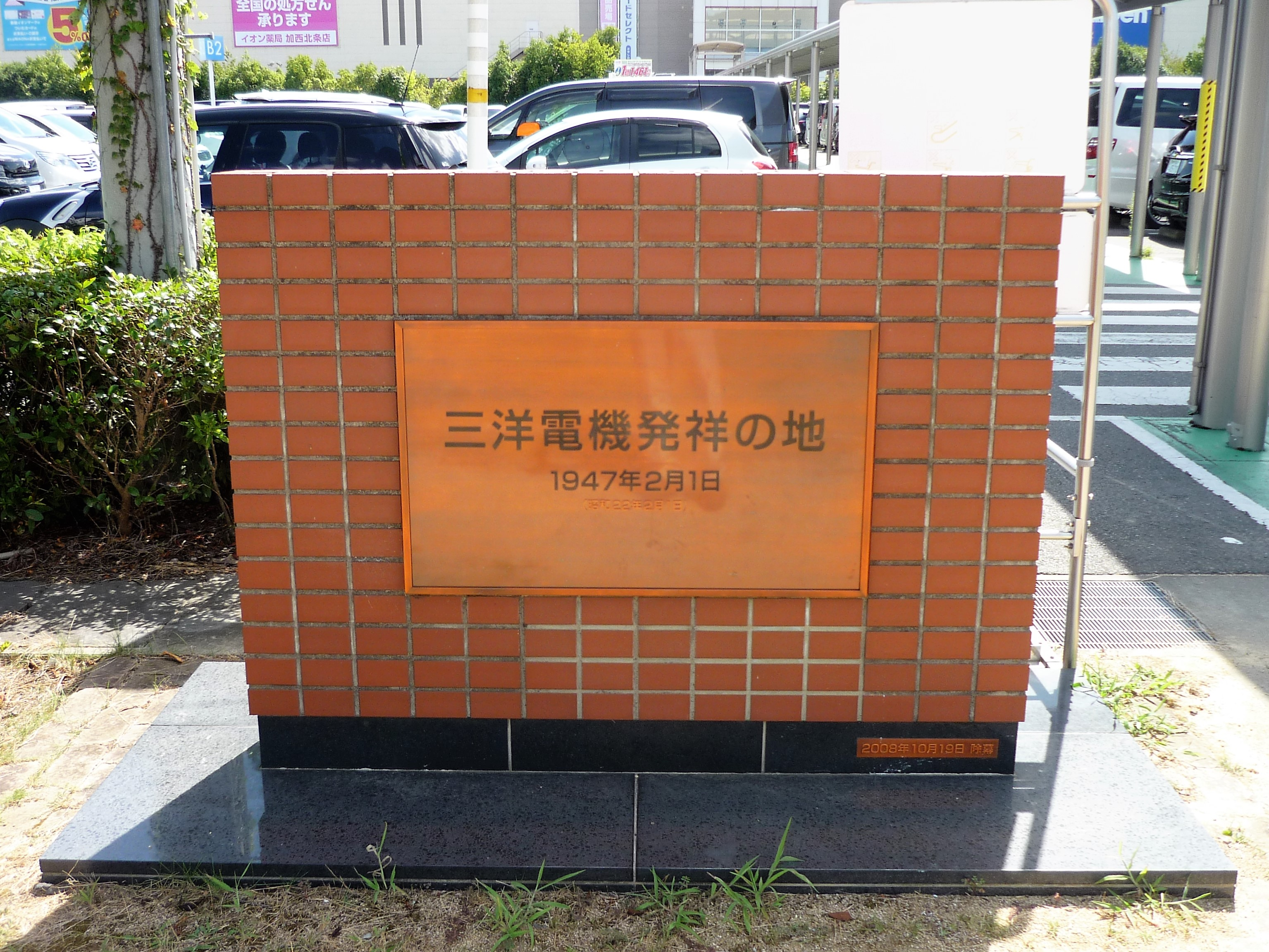 イオンモール加西北条敷地内にある「三洋電機発祥の地」記念碑